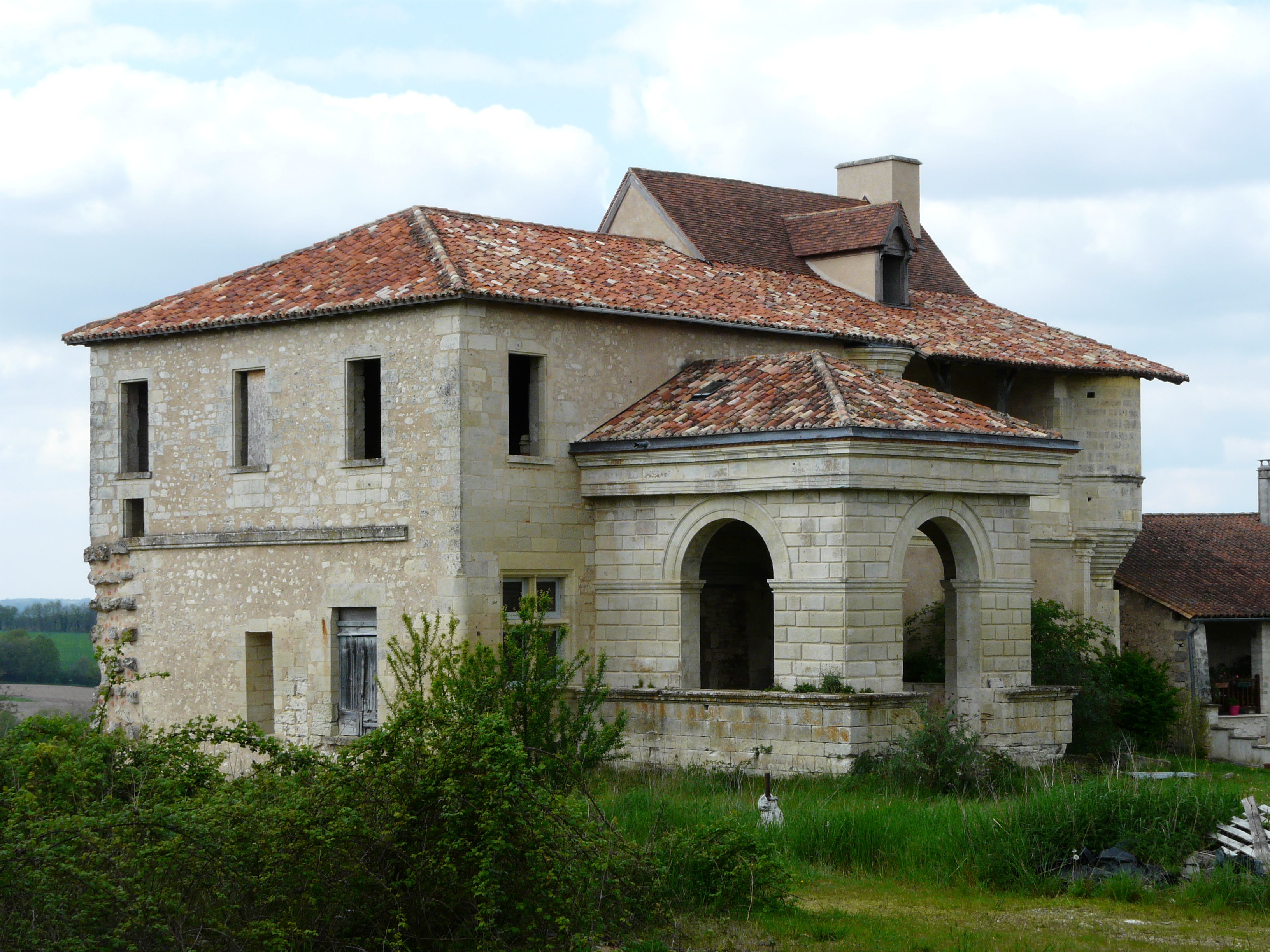 Le château de la Rolphie vu du sud-est, Coulounieix-Chamiers, Dordogne, France.